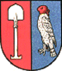 Wappen der Herren Dirck Jansz Graeff (1532-1589) und Jakob Dircksz de Graeff (1571-1636)